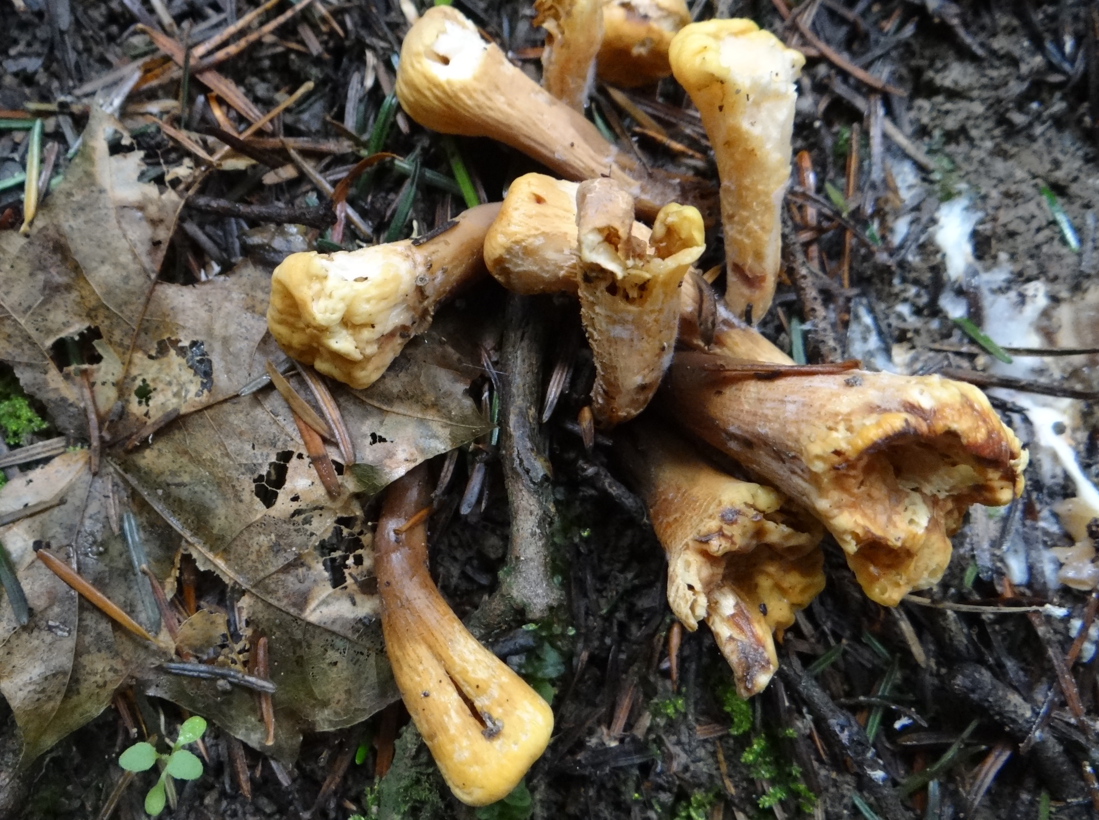 Clavariadelphus truncatus (location: Poland, Pieniny, dolna część Wąwozu Szopczańskiego)